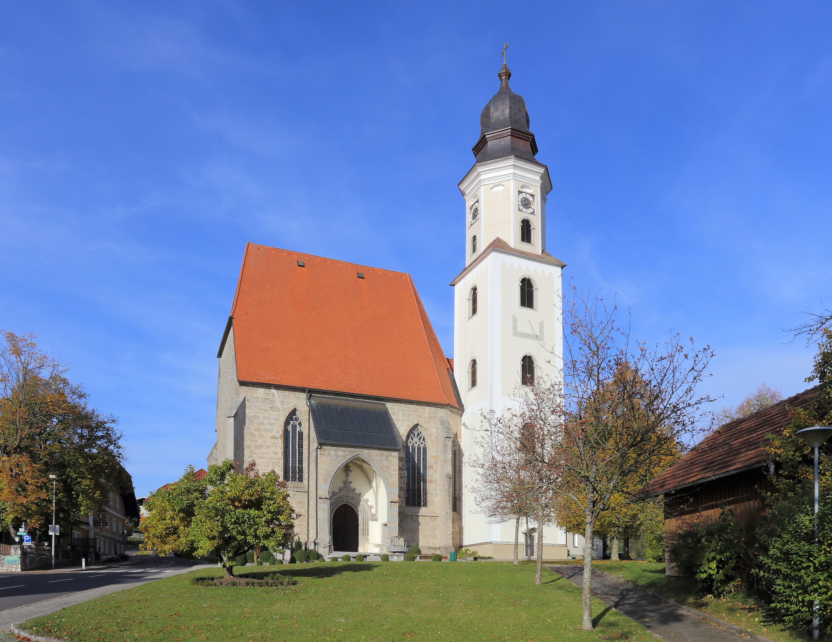 Südansicht der katholischen Pfarrkirche Mariä Heimsuchung in der oberösterreichischen Gemeinde Zell am Pettenfirst. Eine spätgotische, dreischiffige Kirche aus dem Ende des 15. Jahrhunderts mit einem eingezogenen zweijochigen Chor. Der Turm im südlichen Chorwinkel wurde 1672 bis 1677 von einem Adam Wieser aus Braunau errichtet.